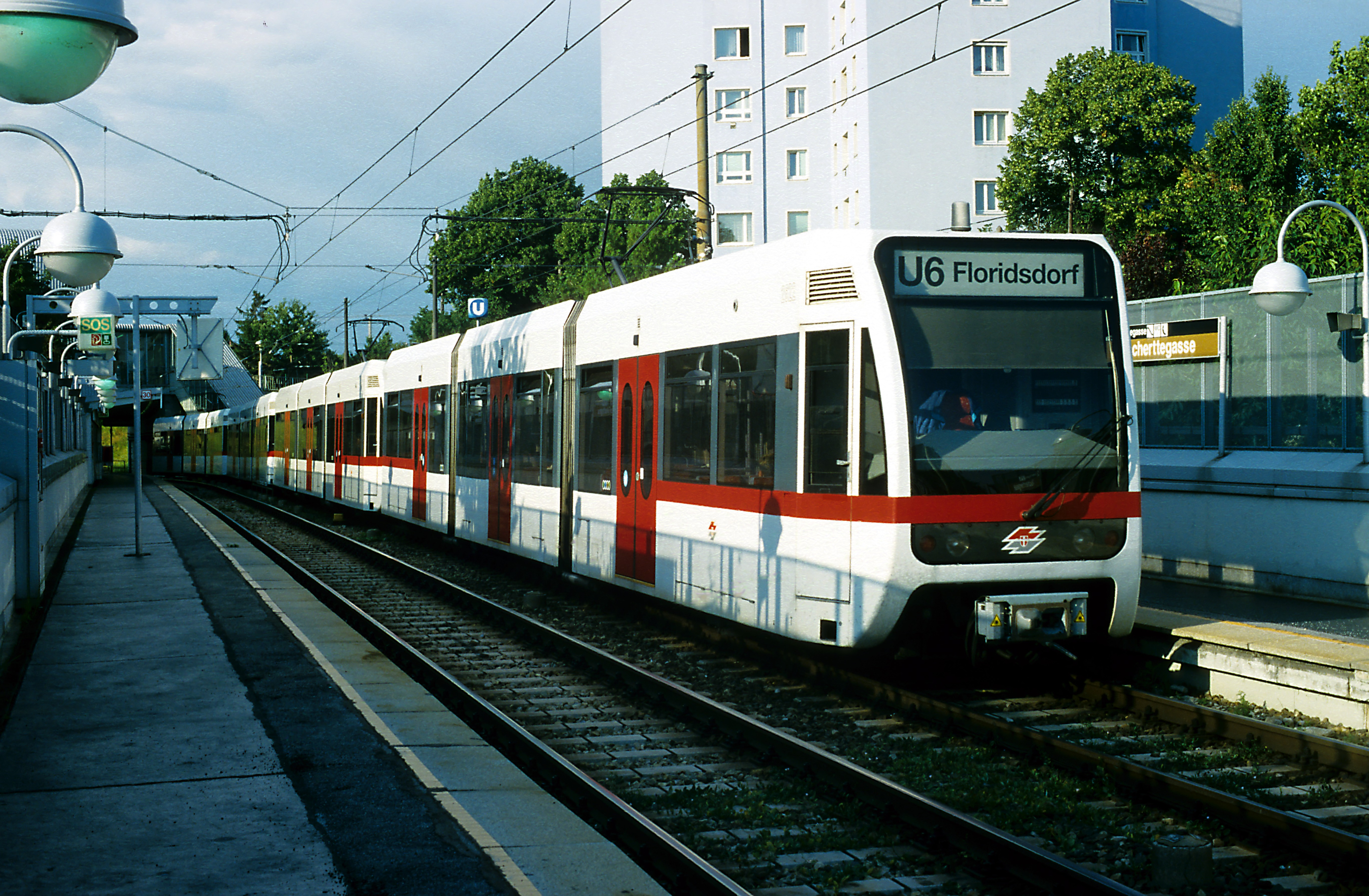 Zug nach Floridsdorf, gebildet aus vier Wagen des Typs T. Zum Aufnahmezeitpunkt verkehren die Züge noch mit Zielfilmeinrichtungen. Wegen der geforderten Kuppelbarkeit mit den Wagen der Typen E6/c6 musste die Vielfachsteuerung beim Typ T ebenfalls optisch übertragen werden, deshalb die Laser-Warnaufkleber auf den Abdeckungen der Kontaktsätze.Der Gleisabstand ist auffällig klein, die Anlagen hier wurden für die Schnellstraßenbahnlinie 64 gebaut. Die Bahnsteige waren seinerzeit allerdings deutlich kürzer und das Zugangsbauwerk bestand noch nicht.Im Nachhinein fällt auf, dass die Züge noch zu Anfang des 21. Jahrhunderts ohne Rückspiegel verkehrten.